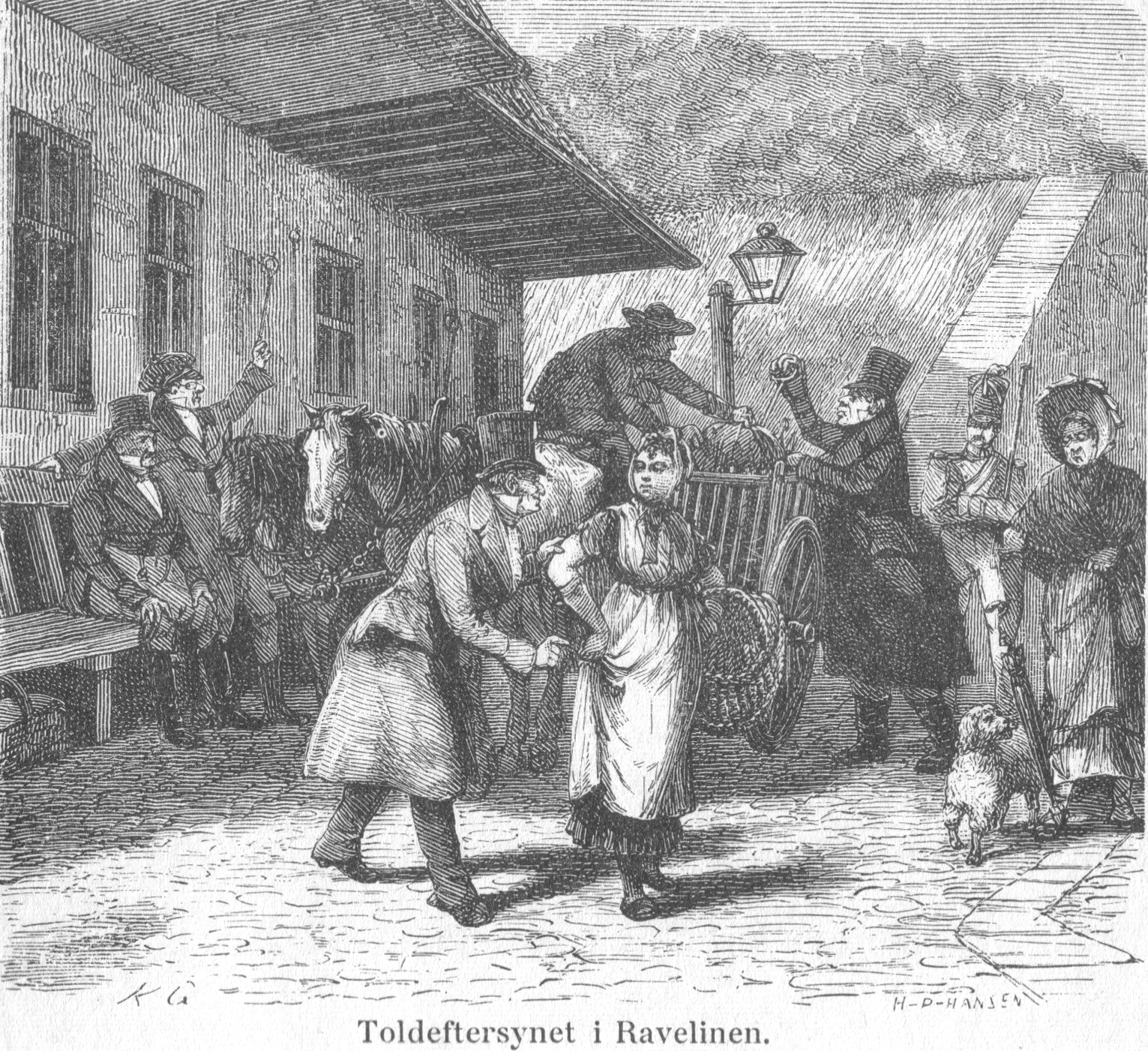 Toldeftersynet i Ravelinen i 1800-tallet